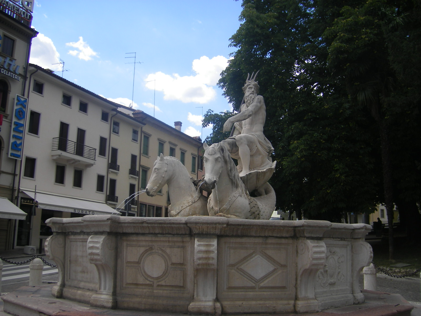 Conegliano